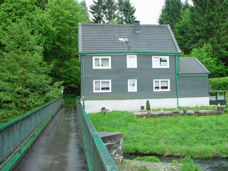 Der Fußgängersteg über die Wupper zwischen Wuppertal-Beyenburg und Ennepetal-Schemm; Haus in Ennepetal